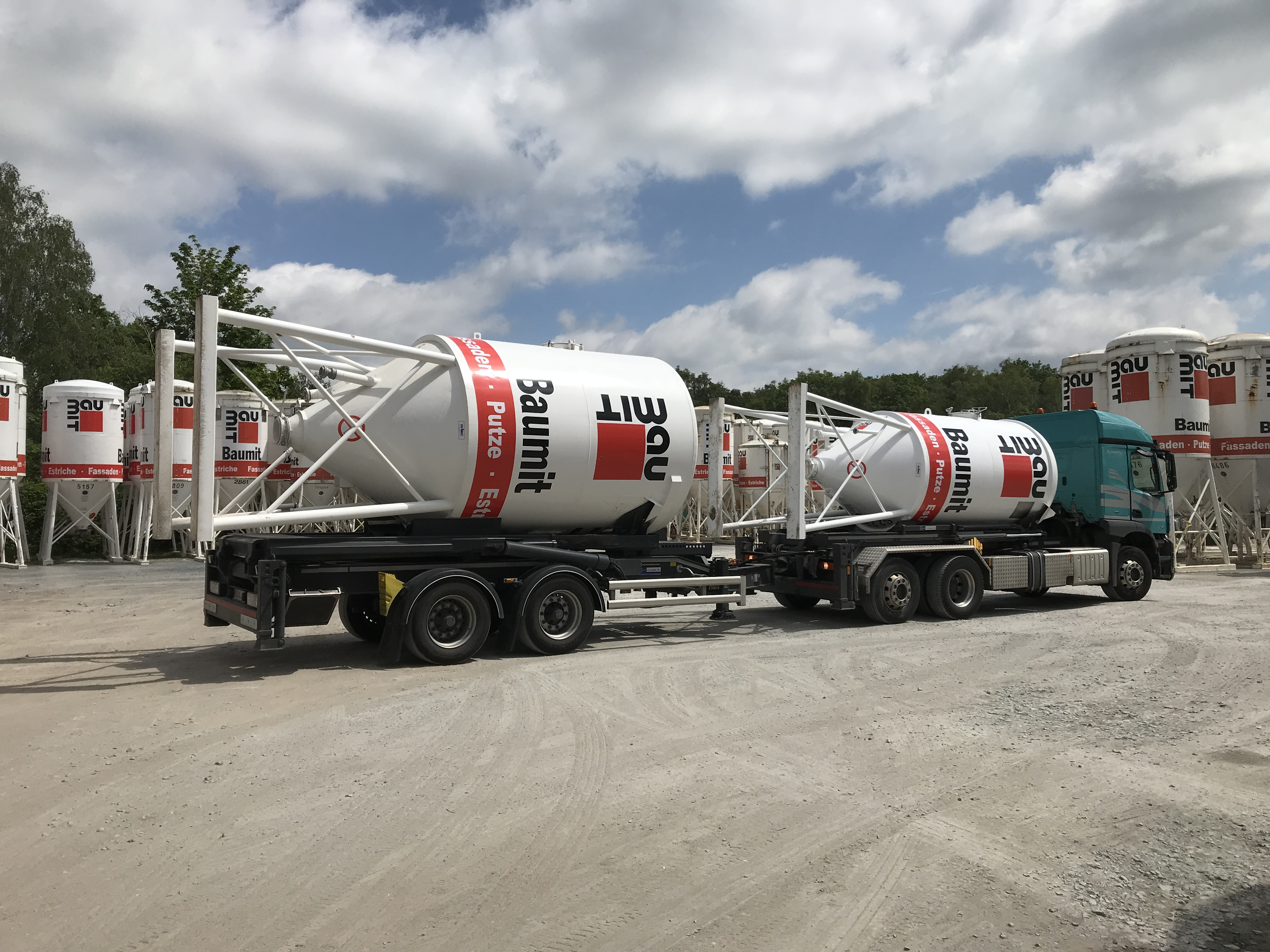 Taschensilosteller mit Anhänger